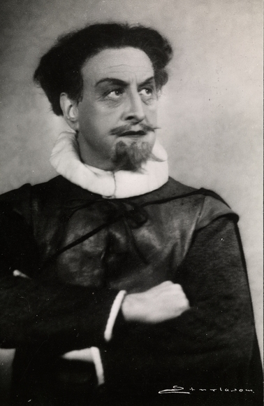 portrett, mann, skuespiller, rollebilde, brystbilde.